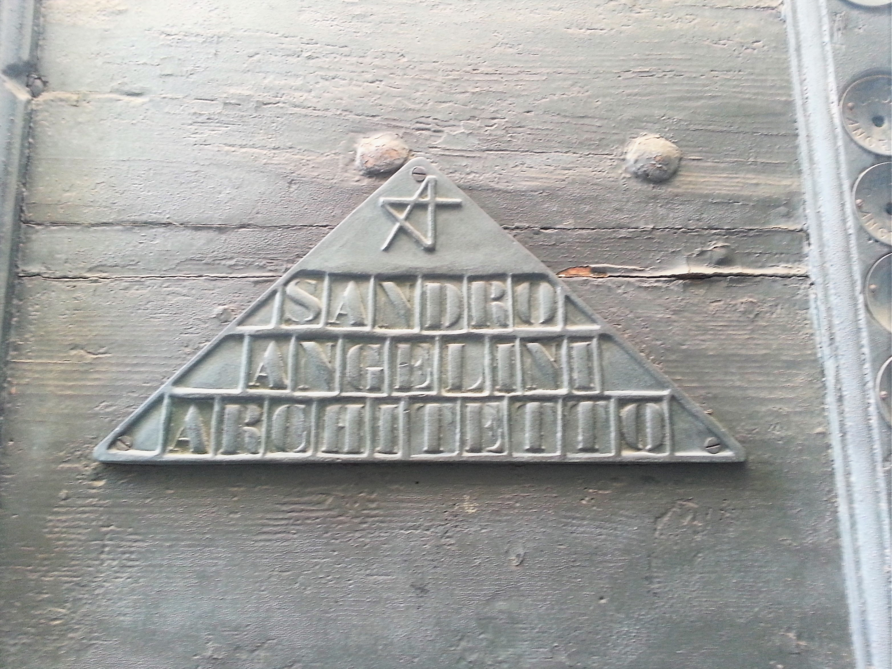 Epigrafe sul portale della casa Migliavacca dei Rivola